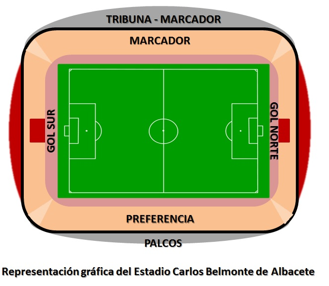 Representación gráfica del graderío del Estadio Carlos Belmonte de la ciudad de Albacete (España)